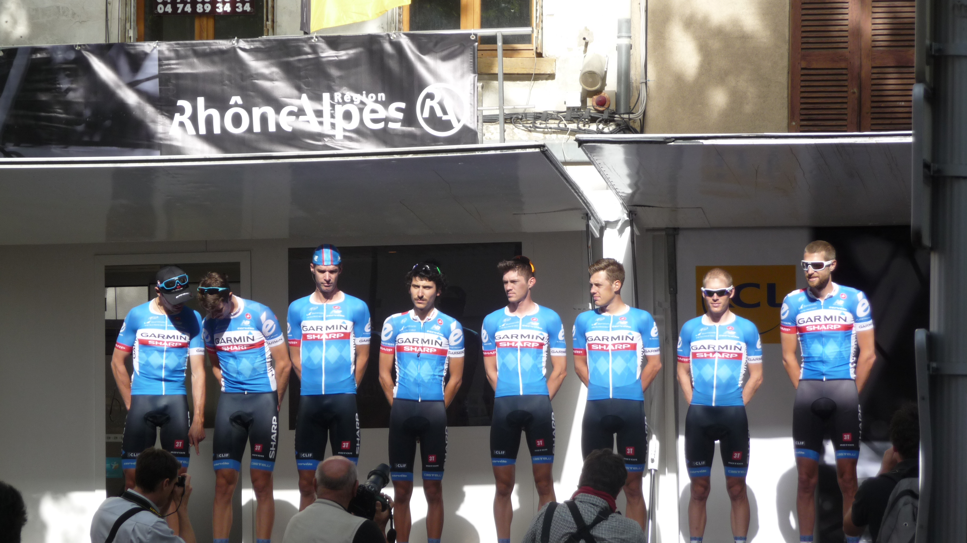 Présentation des équipes du Critérium du Dauphiné 2014 lors du départ de la 2ème étape à Tarare.